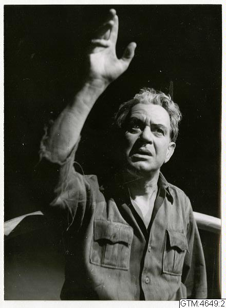 Skådespelaren Tore Lindwall i "När dagen vänder", Göteborgs stadsteater 1955.